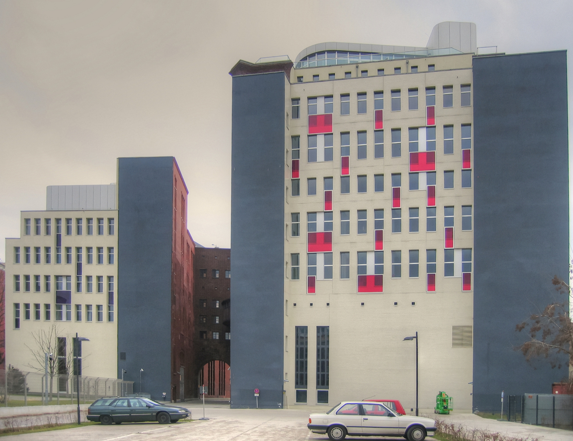 Das E-Werk in Berlin